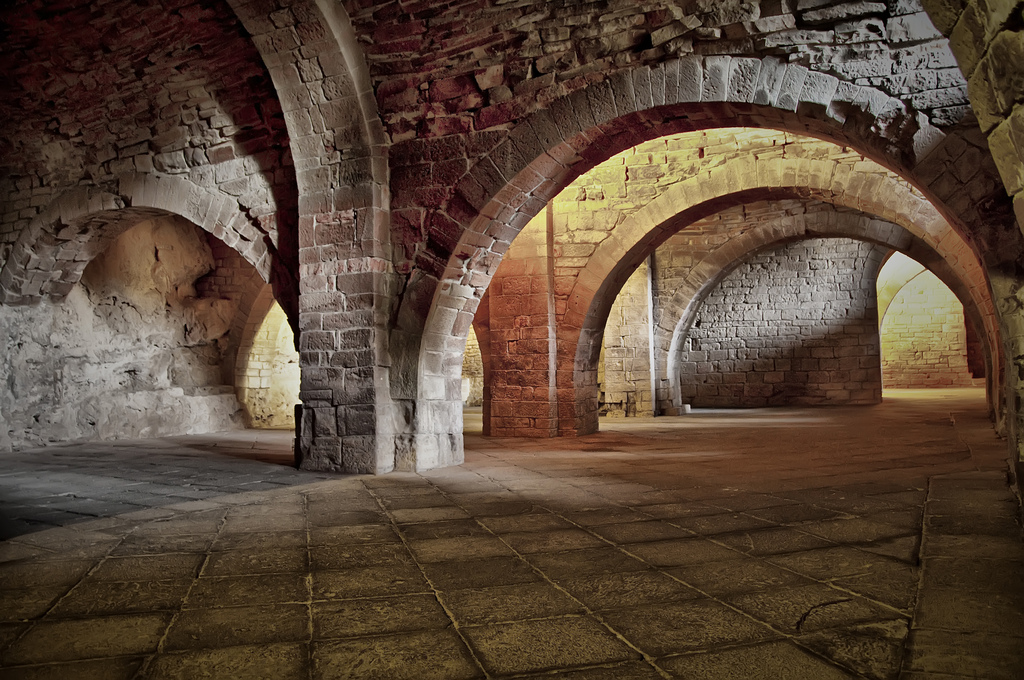 En el vellísimo monasterio de San Juan de la Peña, bajo el claustro están estas salas que era, dónde antiguamente dormían los monjes.